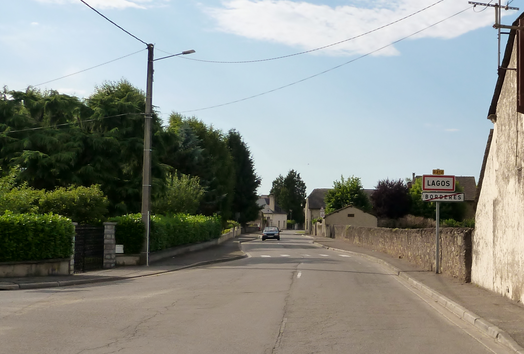 Entrée dans Lagos (Pyrénées-Atlantiques)